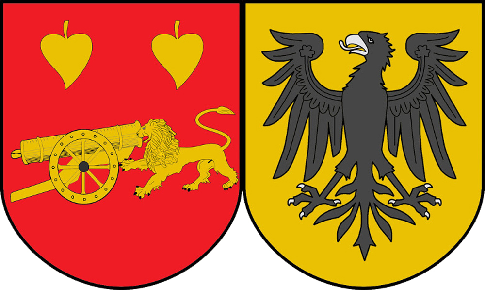 Donemiliaga leinuak erabili zituen armarriak